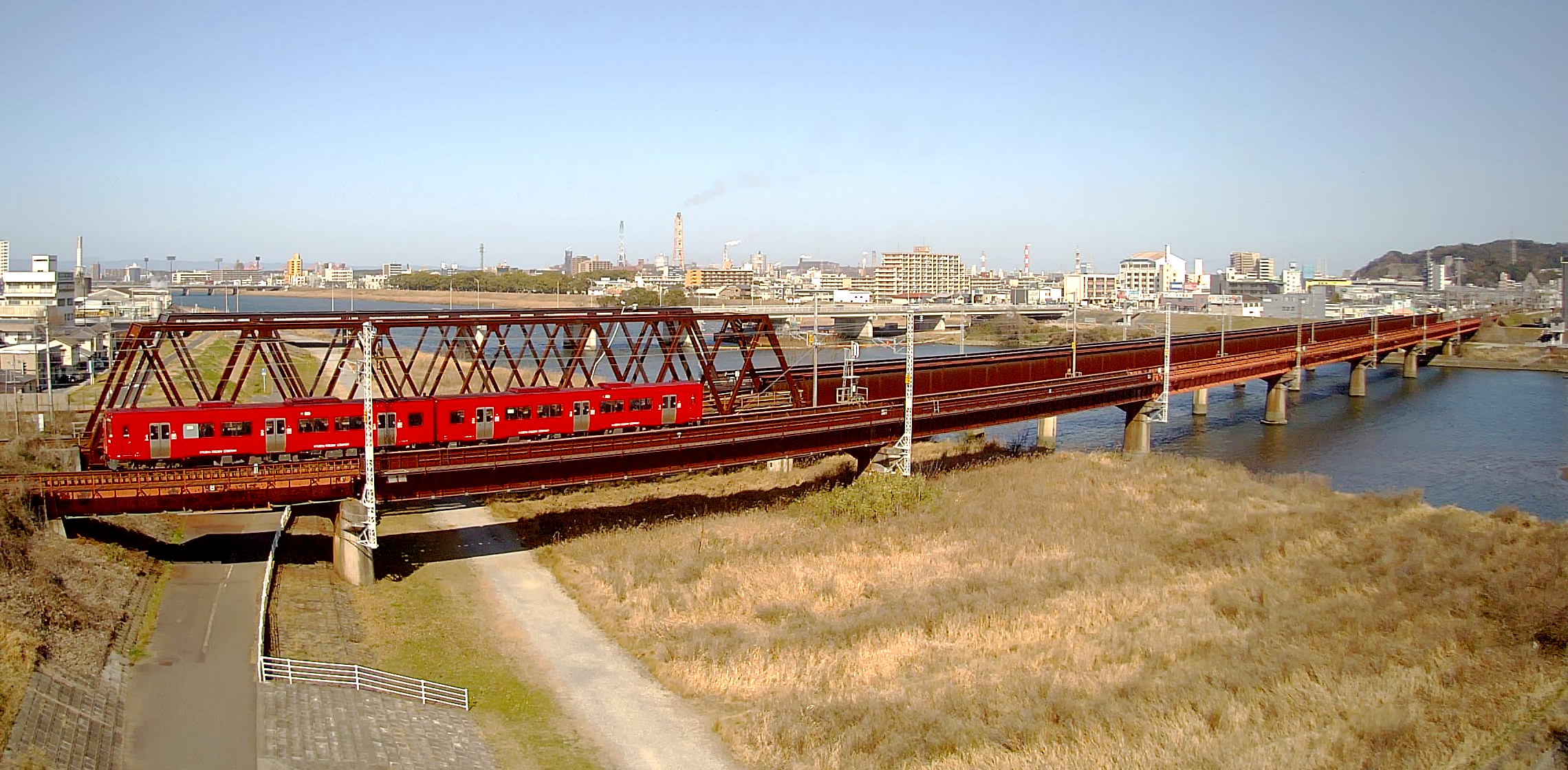 日豊線と豊肥線の大分川橋梁